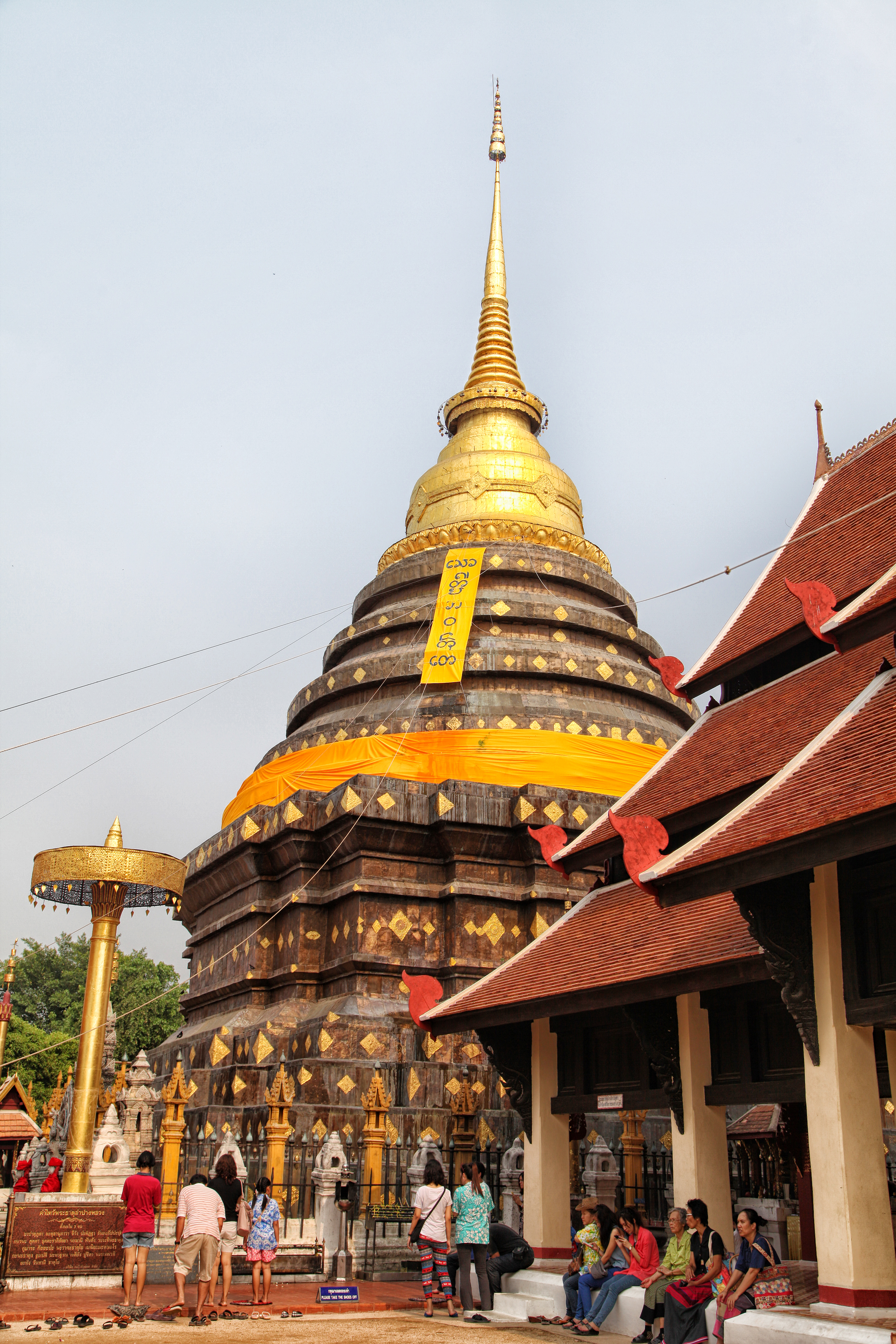 วัดพระธาตุลำปางหลวง